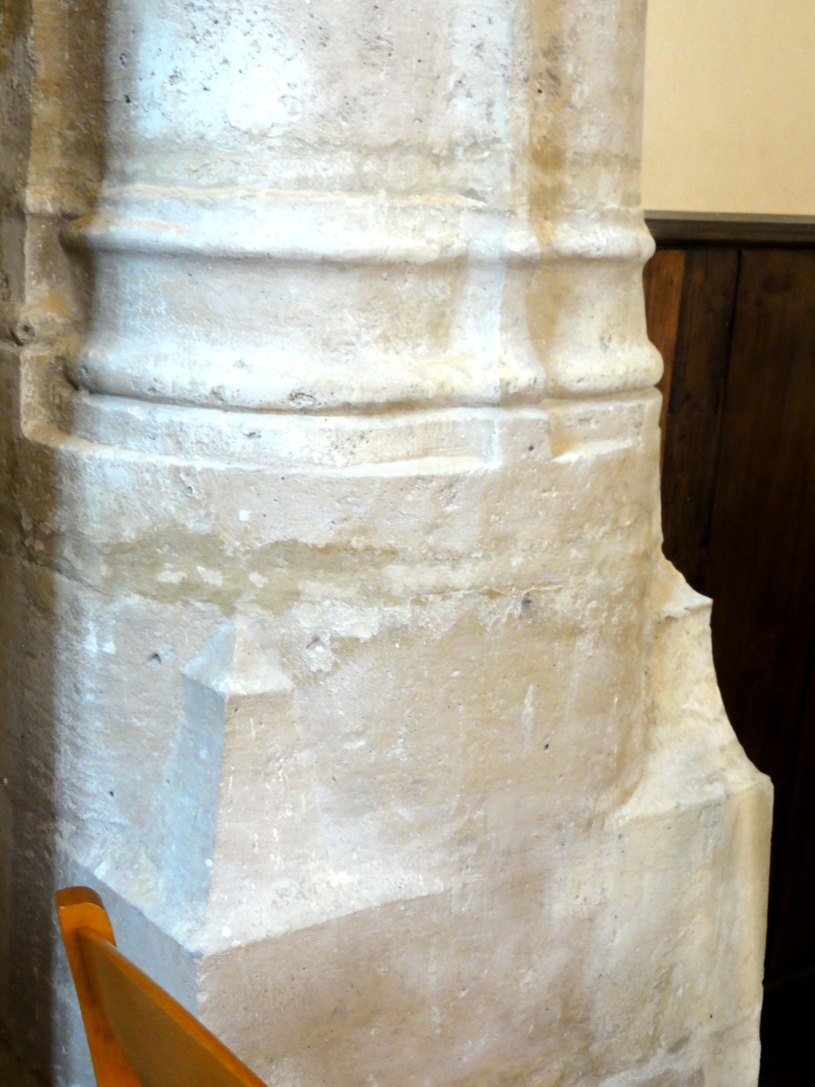 Intérieur de l'église - voir titre.